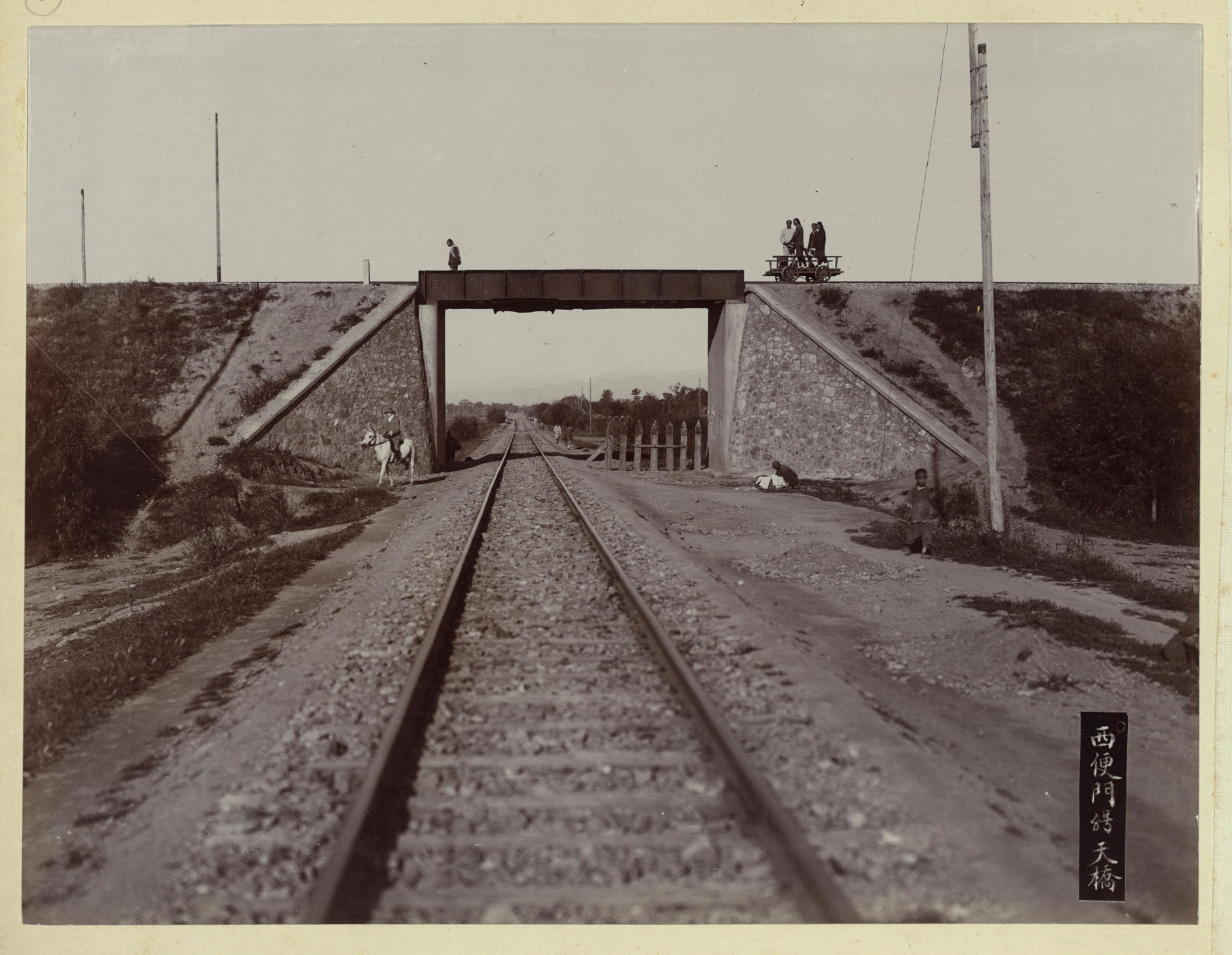 该图显示了京张铁路跨越京汉铁路的5号天桥，该天桥位于西便门。从照片上可见位于铁轨上方天桥上的铁路工人。京张铁路沿线有很多这样的天桥。此图为京汉铁路上由东向西拍摄的，远处为京汉铁路西便门车站，1992年在修建北京西站时拆除